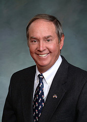 Colorado state representative Larry Liston